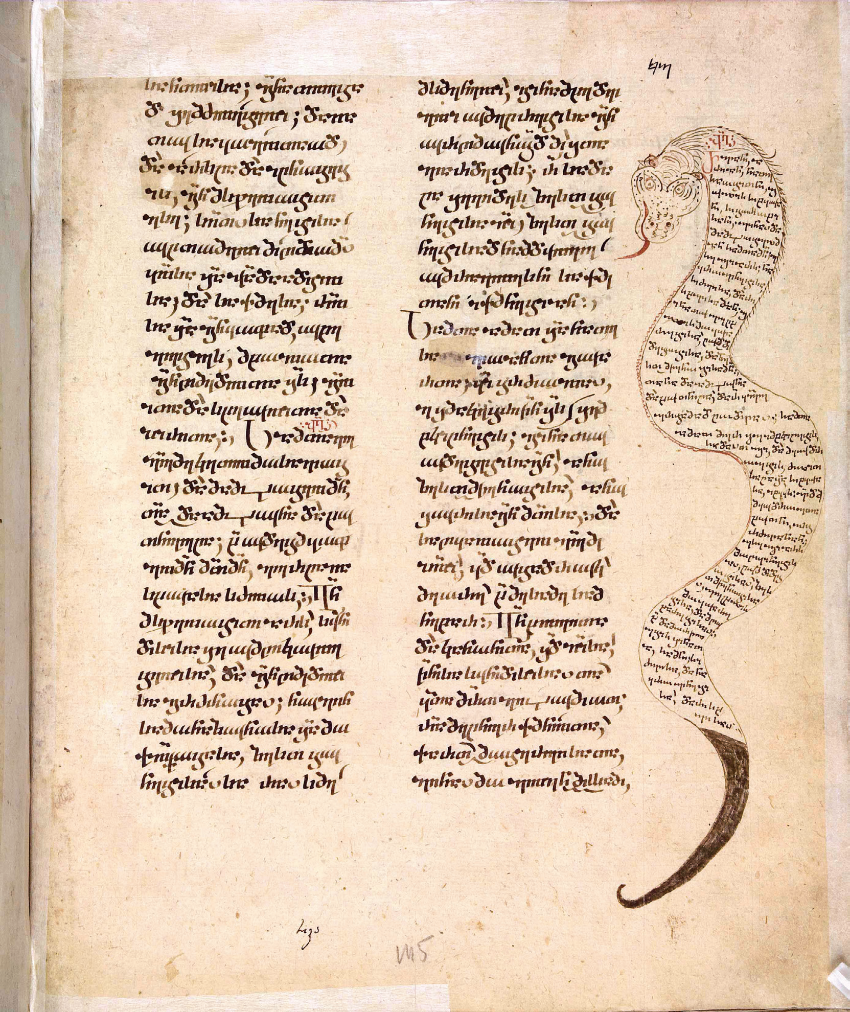 კლემაქსის ანუ სათნოებათა კიბის ექვთიმე მთაწმიდელისეული თარგმანი